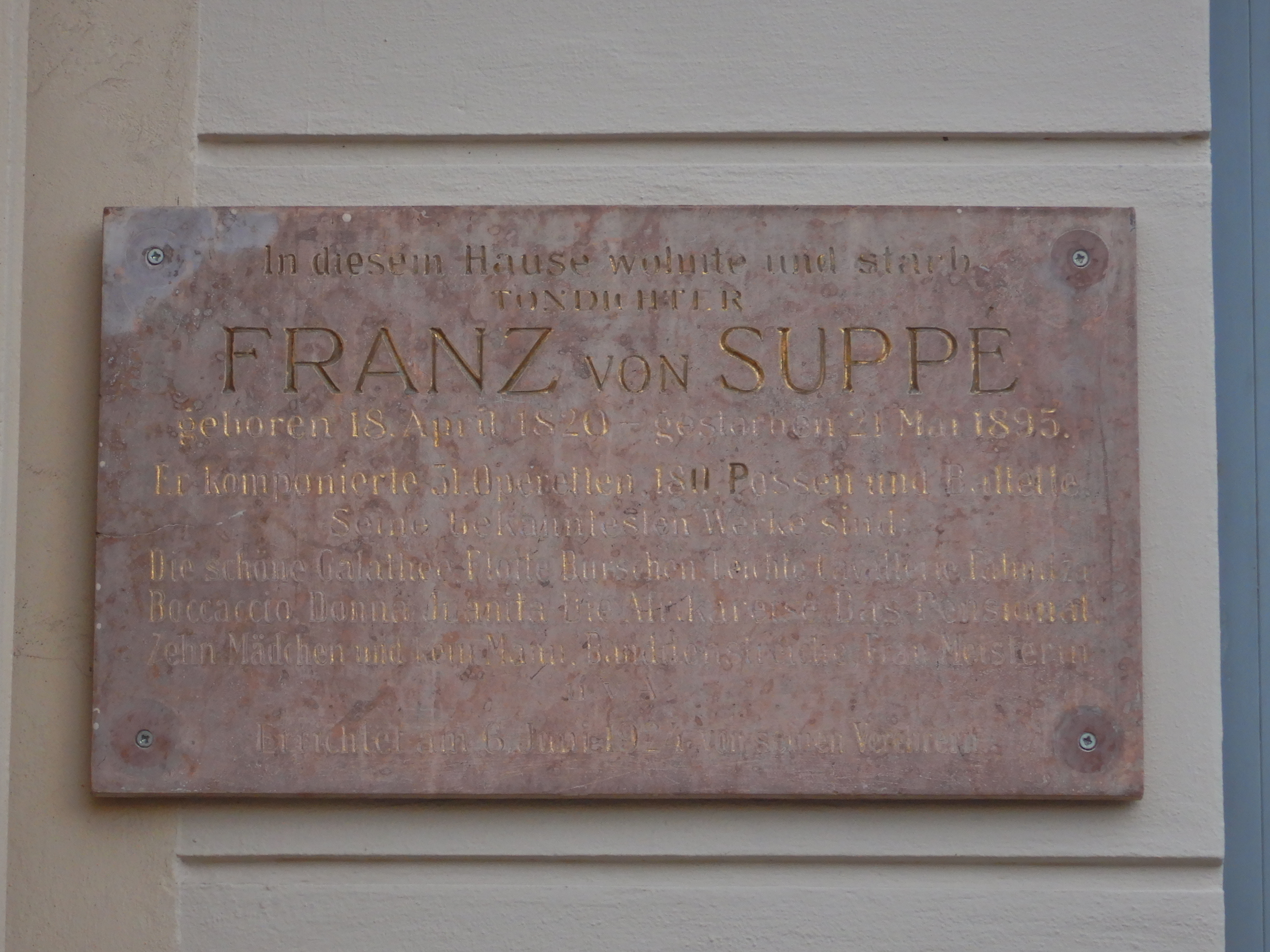 Gedenktafel für Franz von Suppé (Wien, Naglergasse 2)